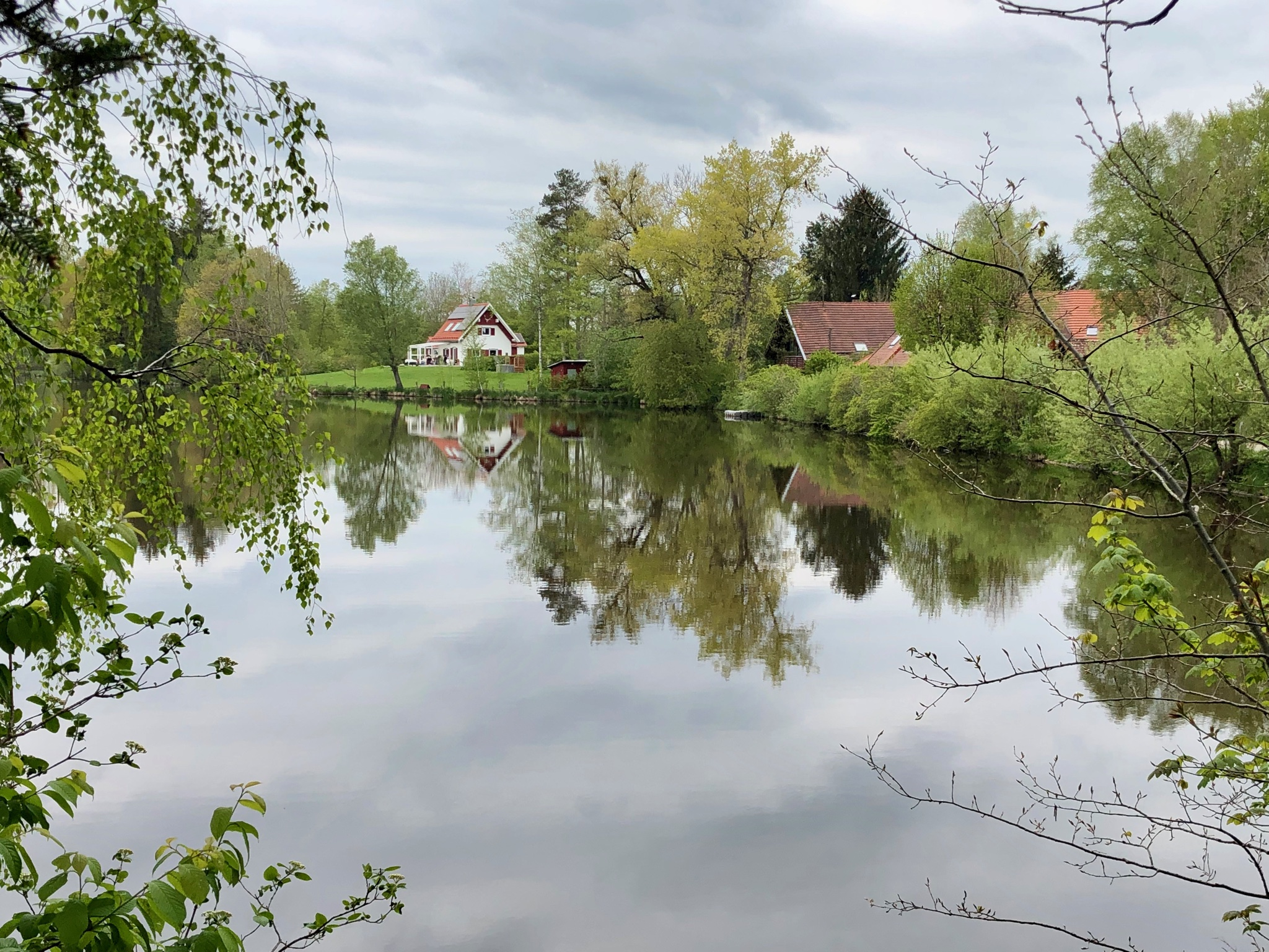 Seehäusl am Engelsrieder See, Rott, Landkreis Landsberg am Lech, Bayern, Deutschland; Blick von Osten